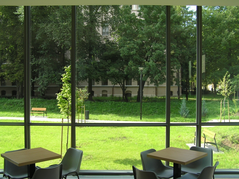 SZTE Kongresszusi Központ kávézója